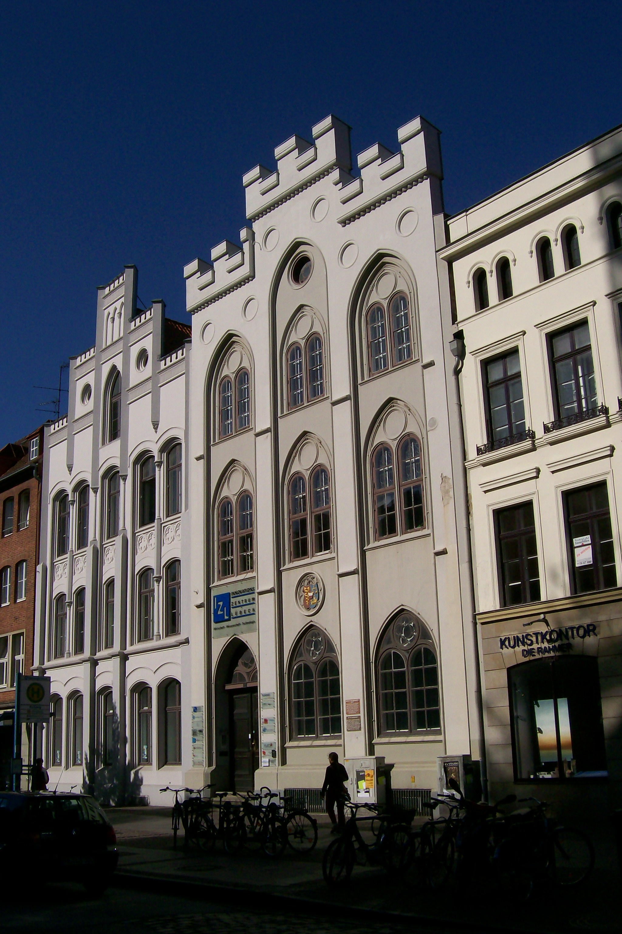 Haus der Kaufmannschaft (Lübeck) in Lübeck neo-gothical front from 1838